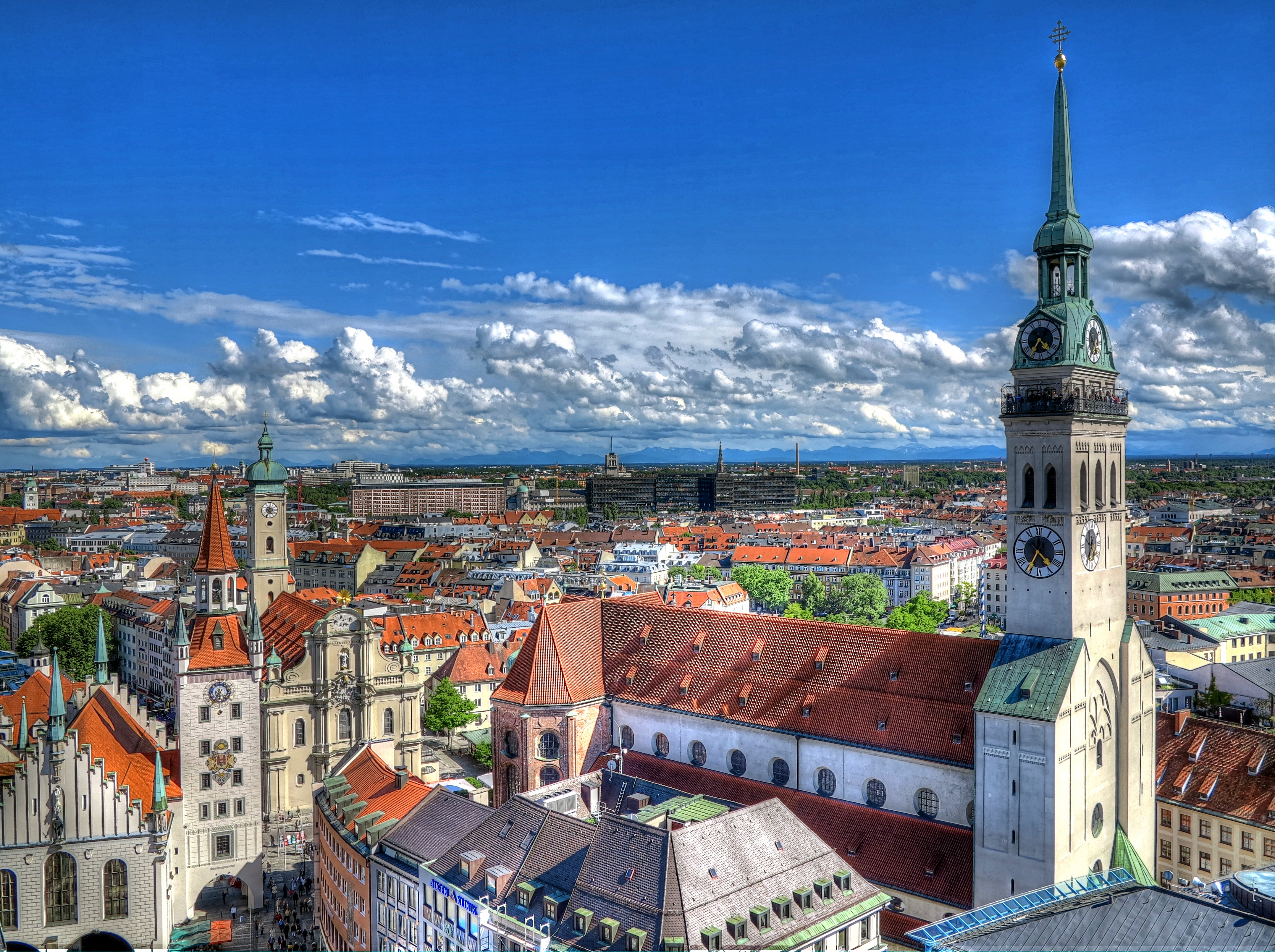 Deutschland, Bayern, München, Blick vom Turm des Neuen Rathauses auf das Alte Rathaus, Talburgtor, Heilig Geist Kirche und Alter Peter (von links nach rechts).